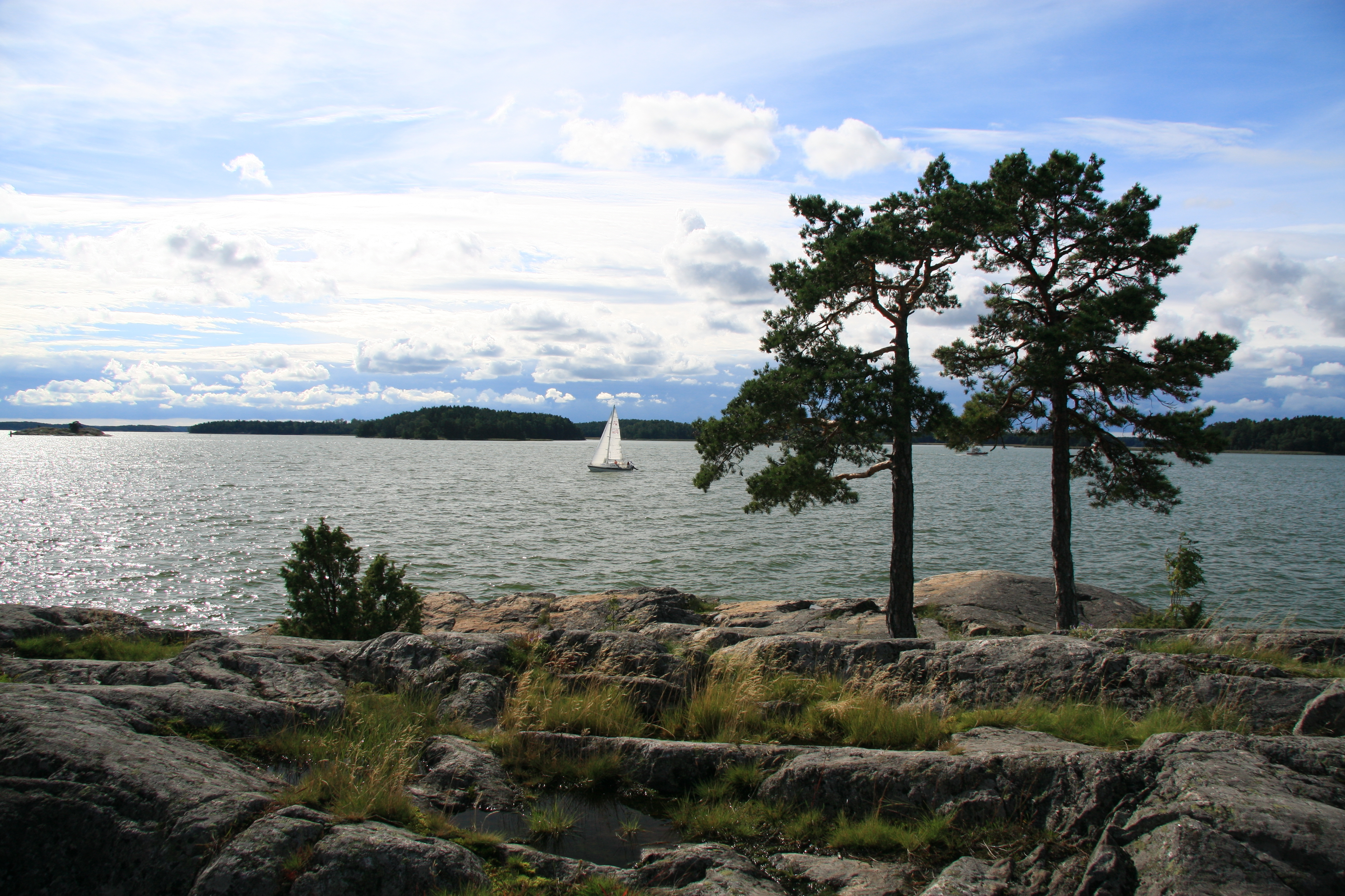 Turku - Ruissalo Island